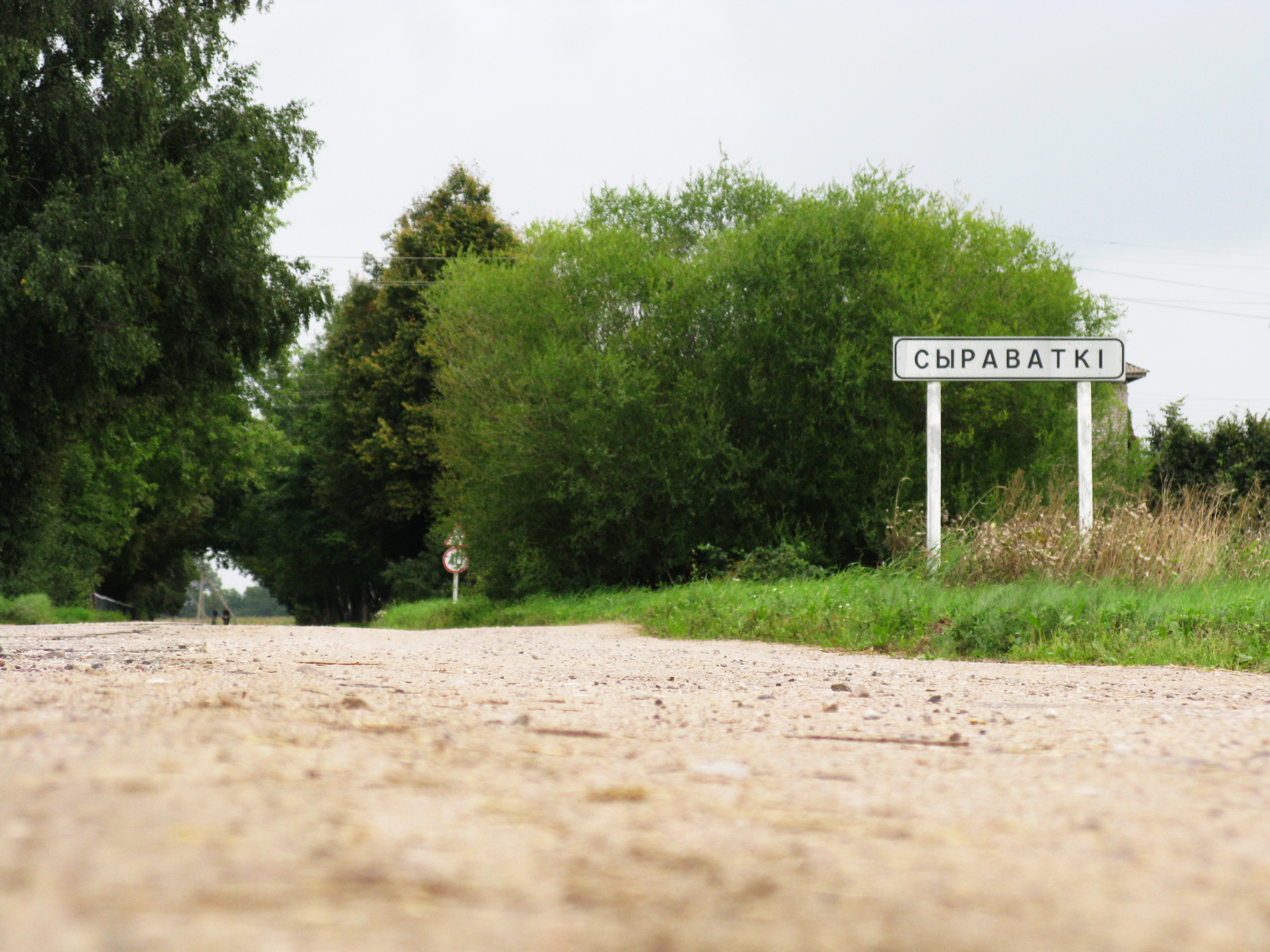 деревня Сыроватки летом 2013 года, на фото начало улицы Школьной (въезд со стороны д.Андреевцы)